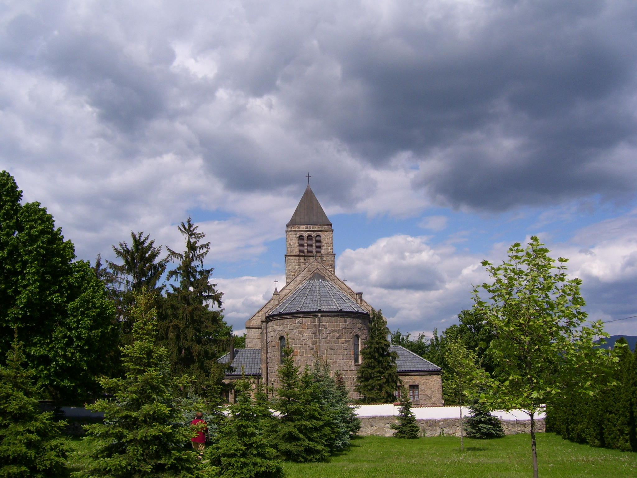 Dunabogdány római katolikus temploma, épült 1939-ben